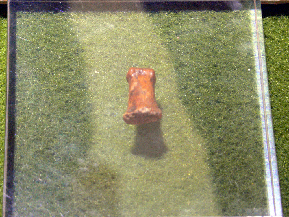 Posible fósil de falange humana encontrado en el yacimiento de Cueva Victoria en Cartagena (España). Datación 1.200.000 años. Posible homo habilis.